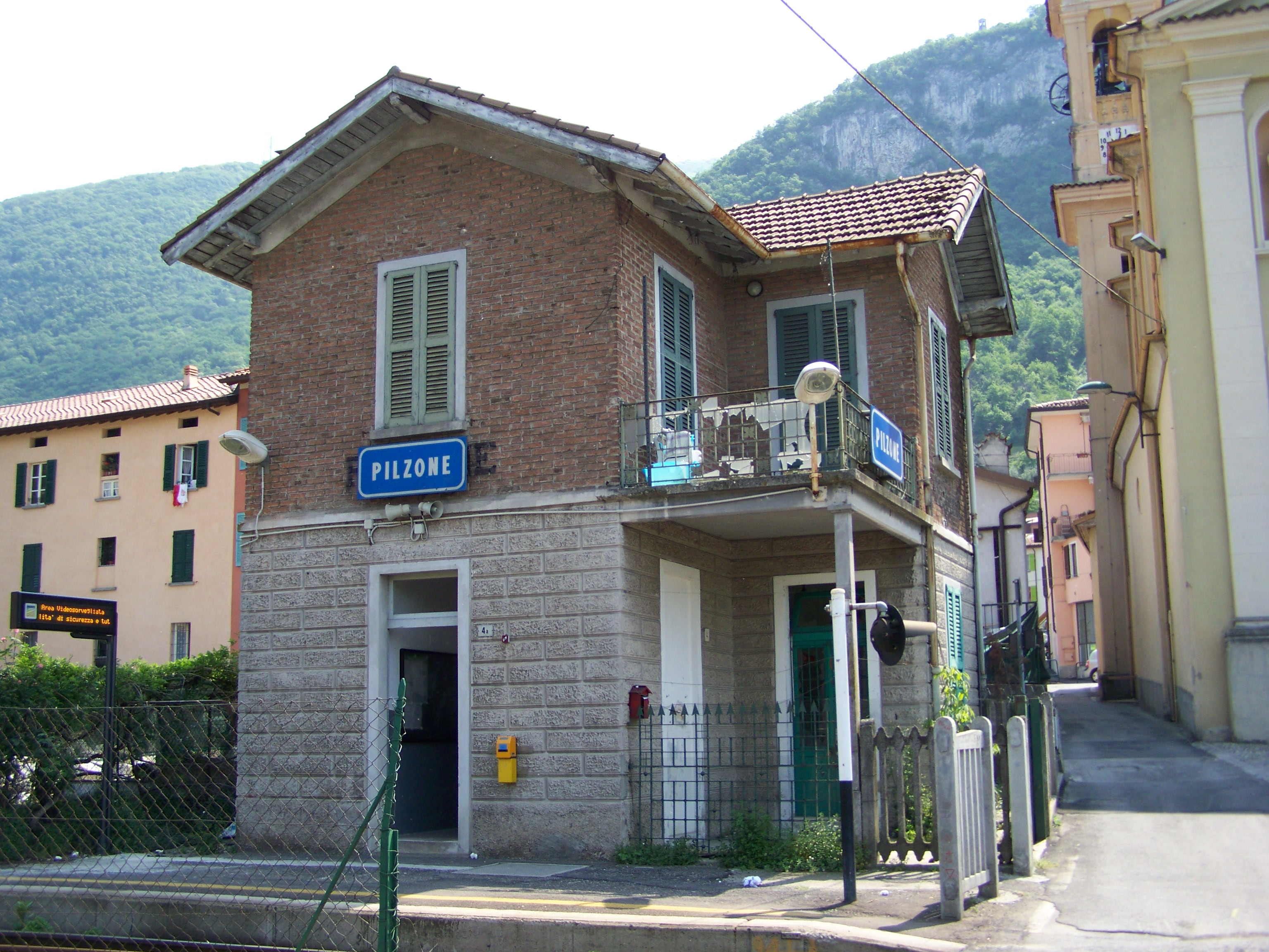 Fabbricato viaggiatori della stazione di Pilzone, lungo la Brescia-Iseo-Edolo